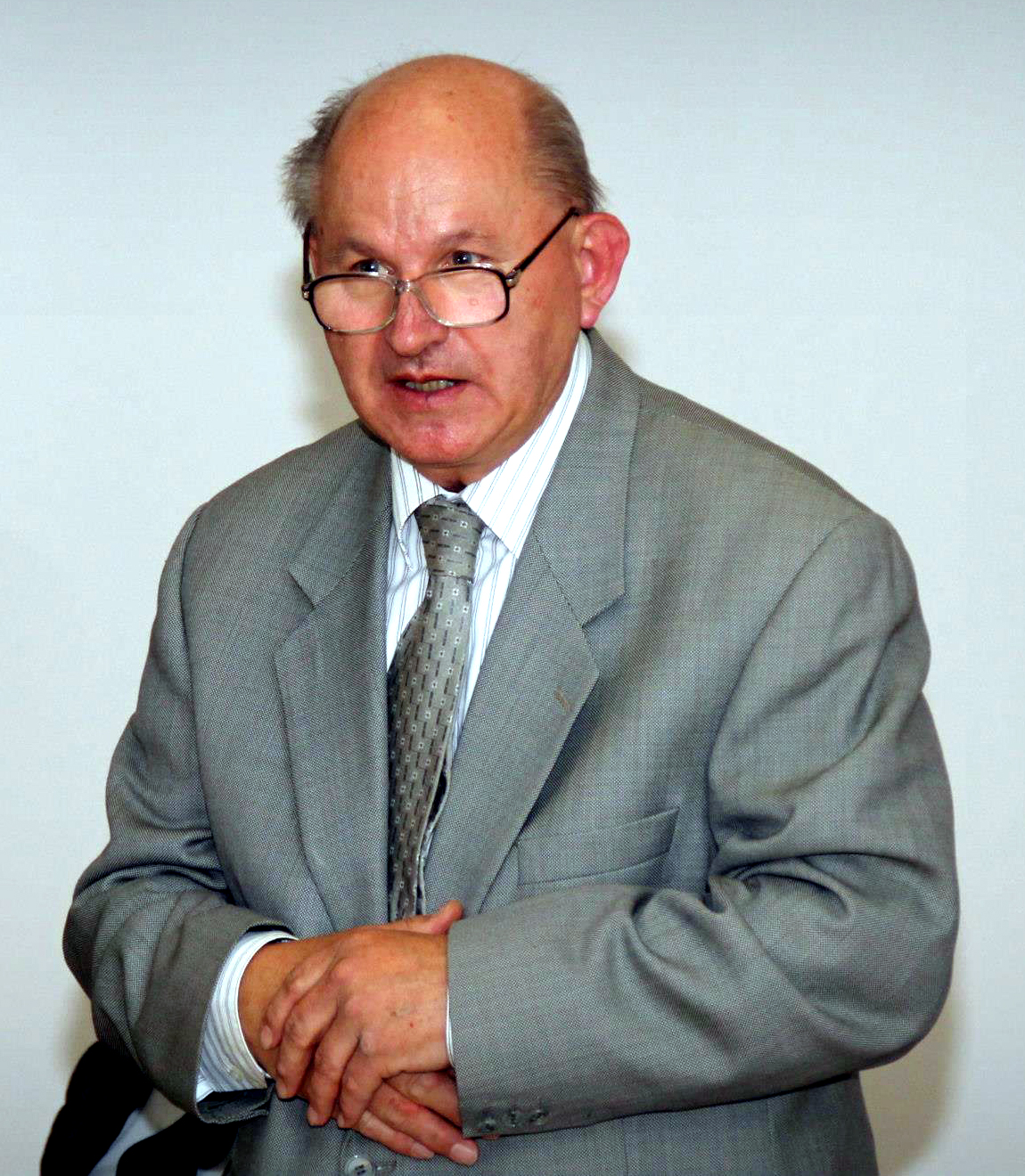 Szabó László Gyula előadást tart Pécsett